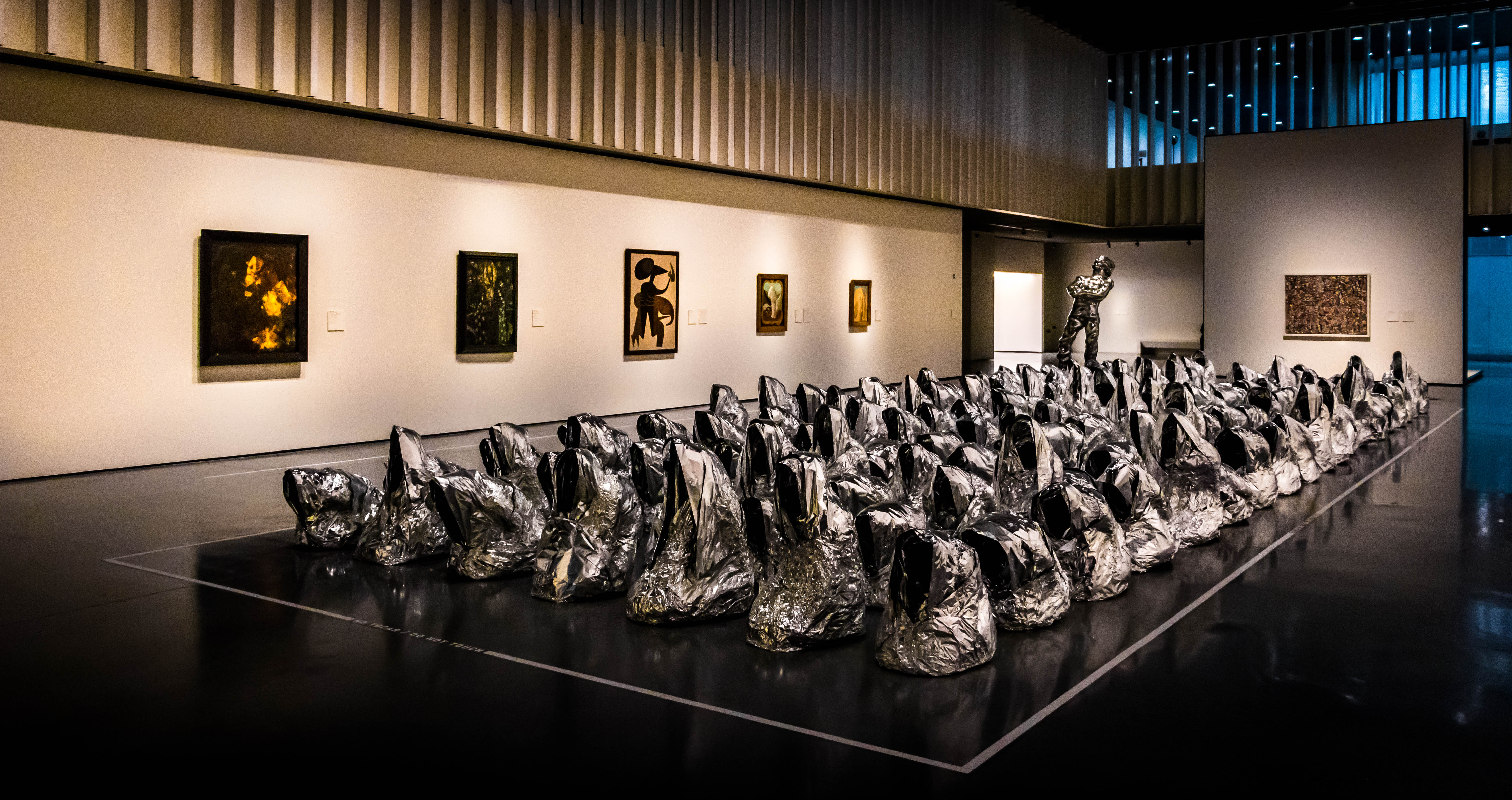 Sala interior Centro Pompidou Málaga.